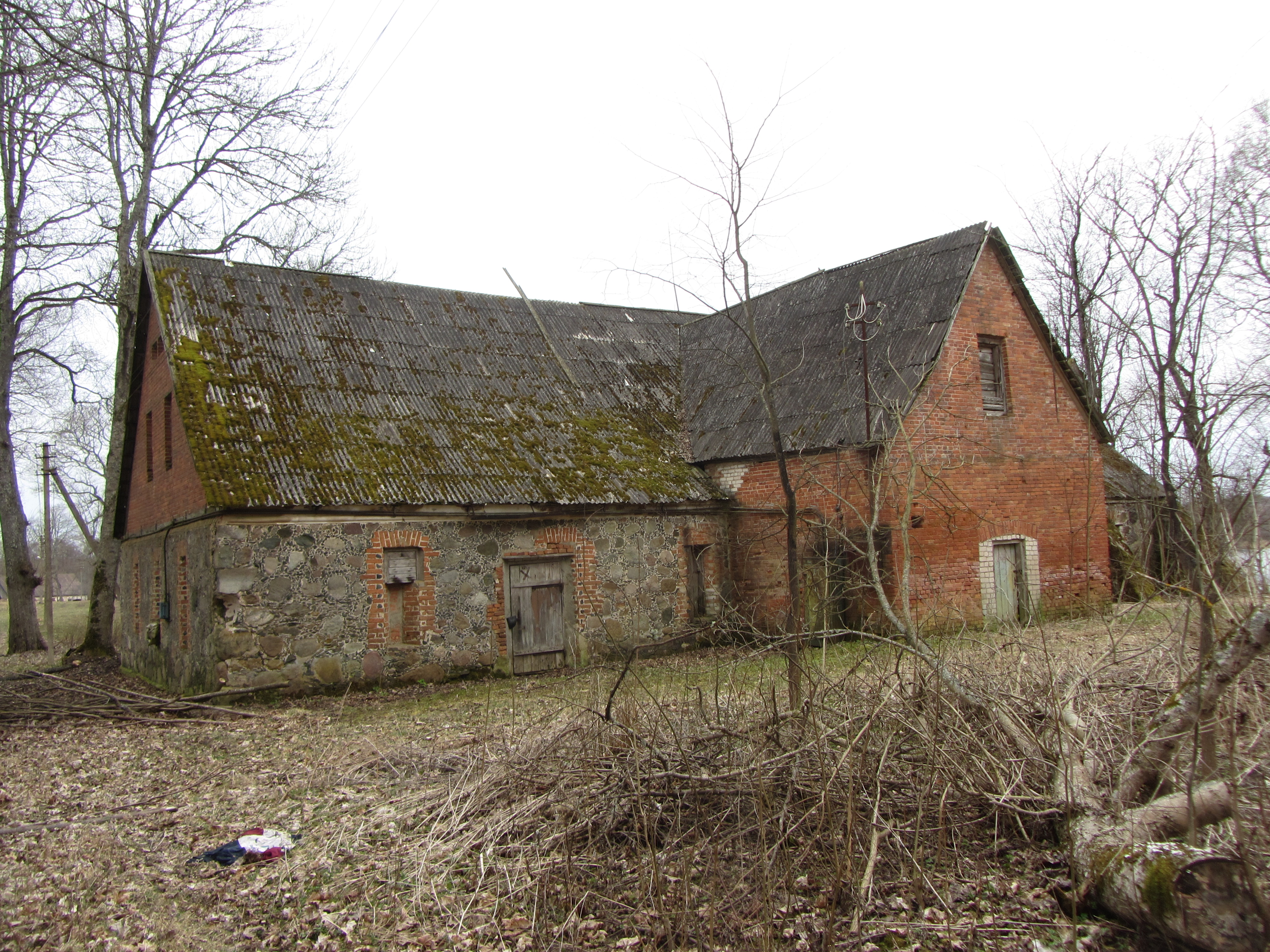 Stelmužė 32295, Lithuania